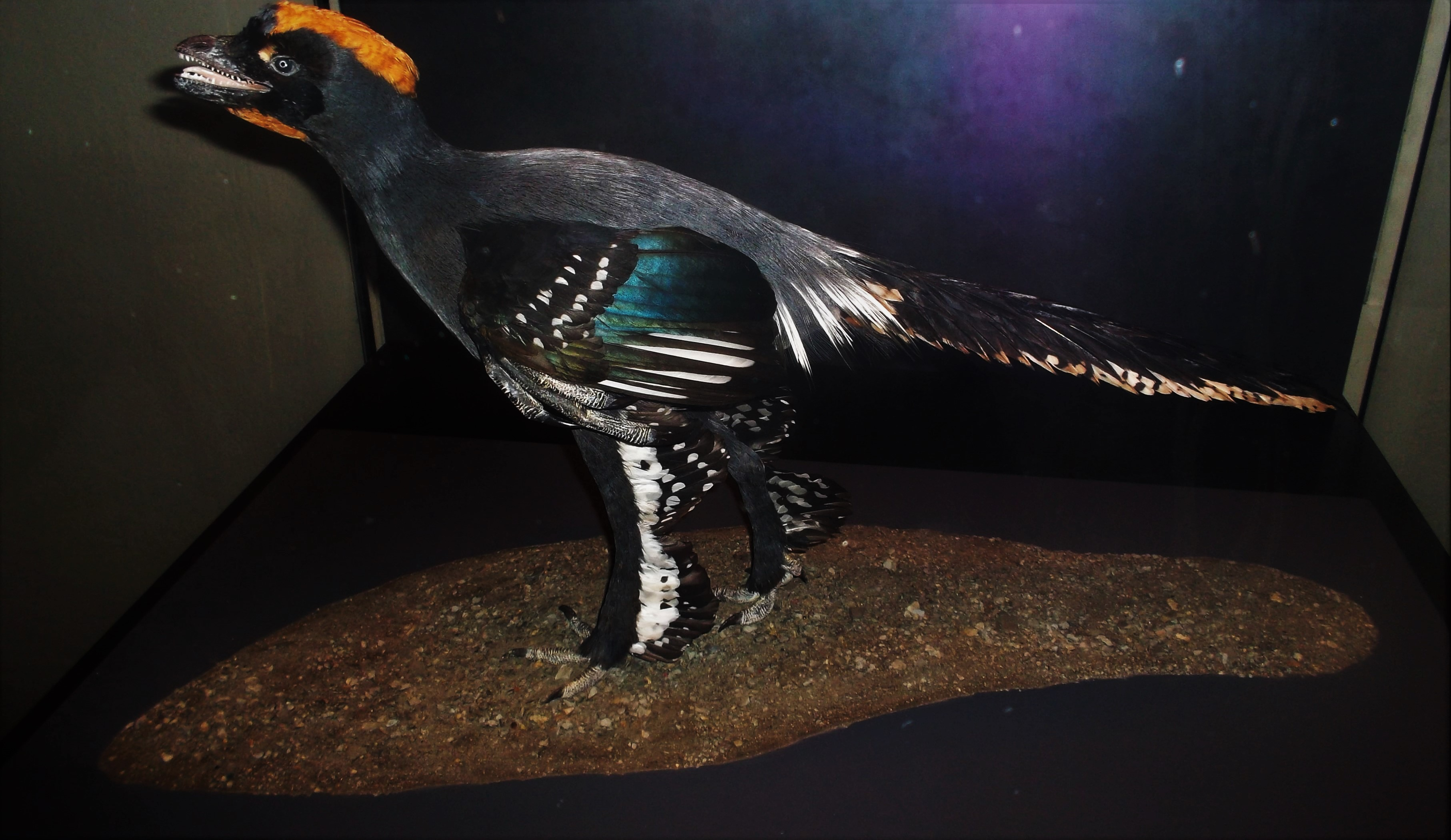 eine Nachbildung des vogelähnlichen Sauriers Anchiornis im Museum für Naturkunde, Berlin